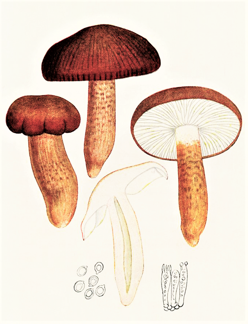 Bres.: Tricholoma striatum (Schaeff., 1774) Quél. (1872), heute teilweise immer noch unter diesem Namen, meistens aber Tricholoma albobrunneum(Pers., 1801) P.Kumm. (1871)